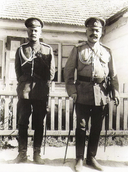 Гусейн хан Нахичеванский